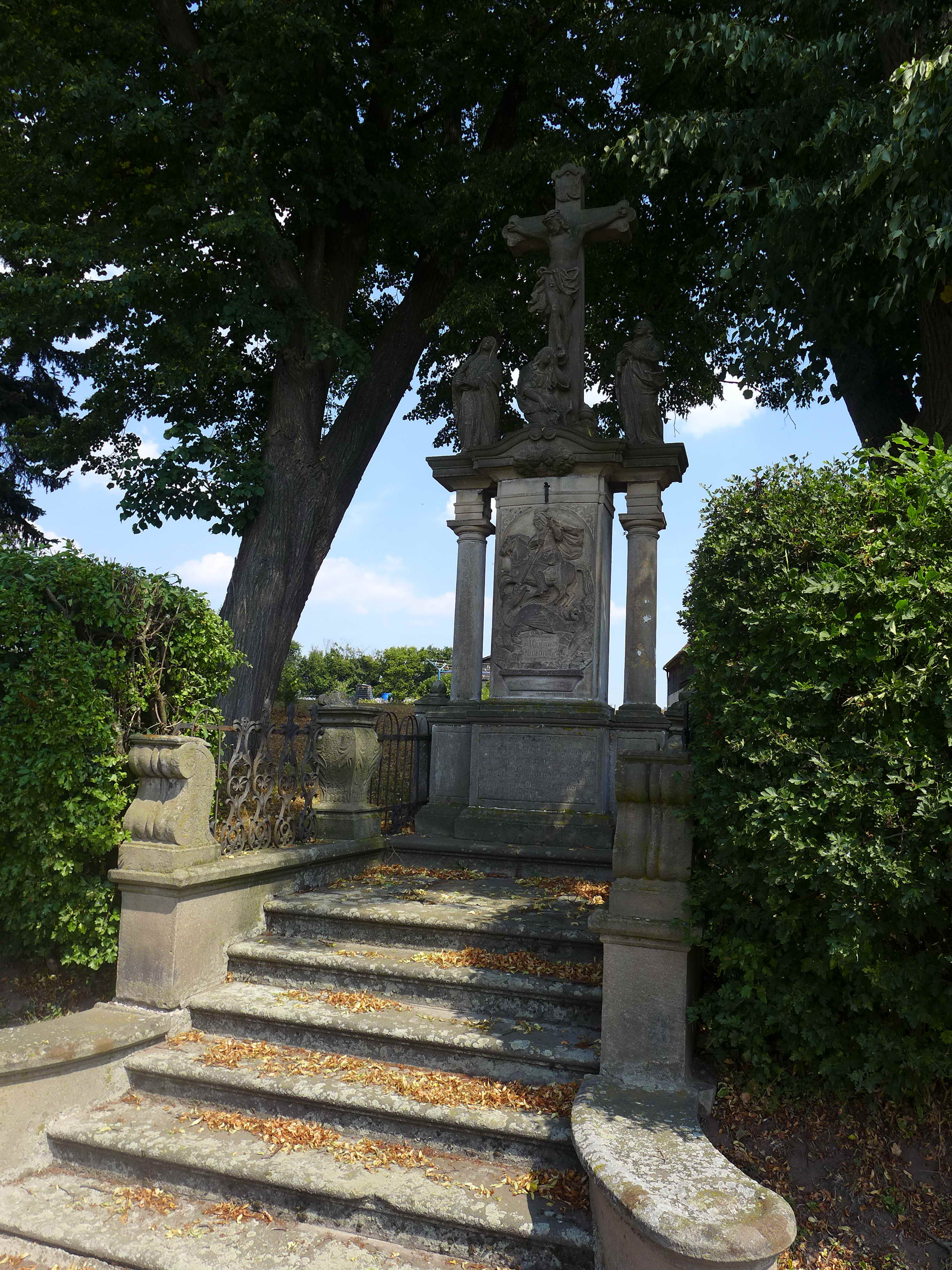 Sloup se sousoším Kalvárie, u domu Kladská čp. 26, pp. 414, Velká Ves (Broumov).